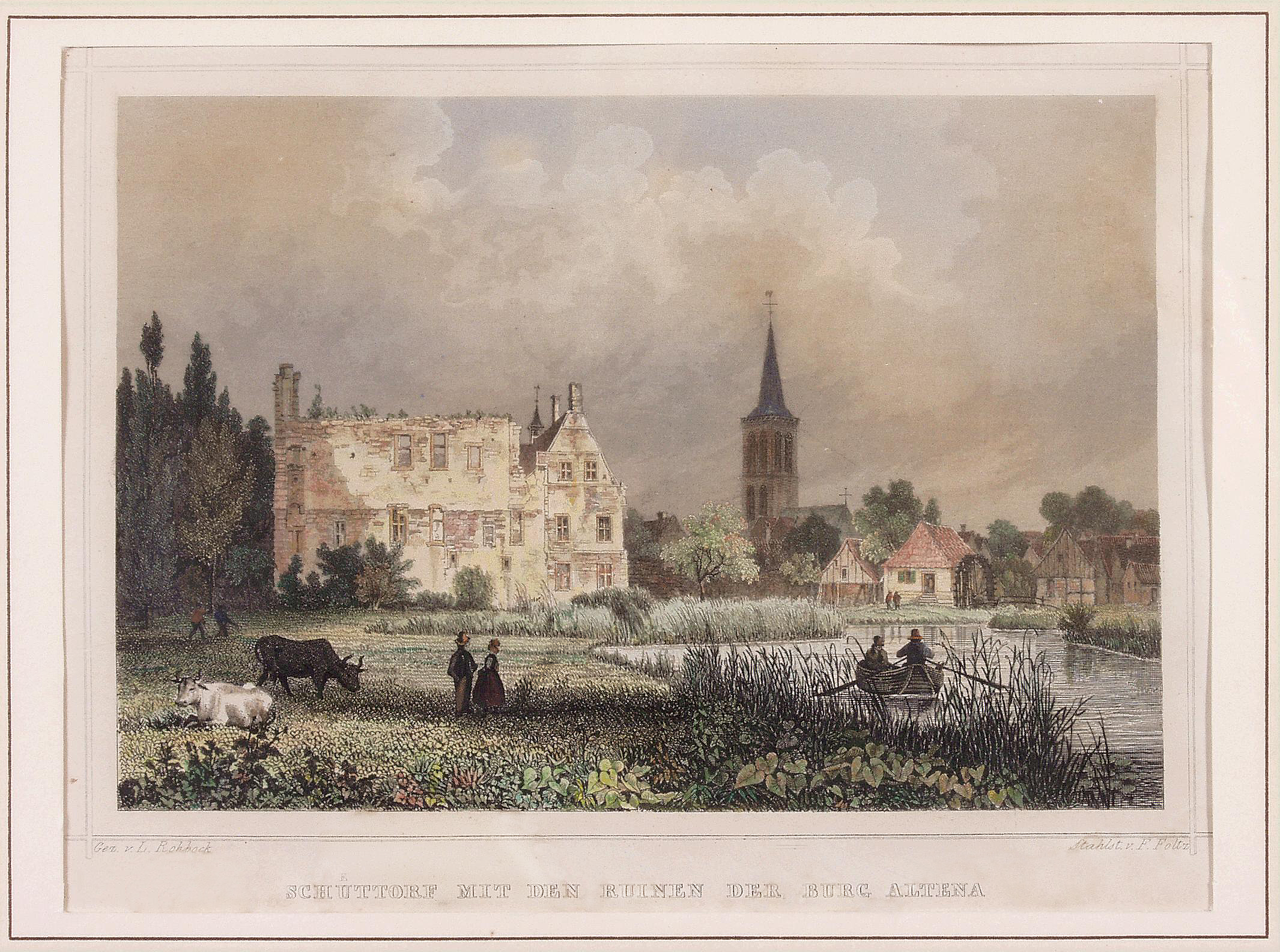 Ein Stahlstich der Stadt Schüttorf mit Ruine der Burg Altena von Friedrich Foltz aus dem Jahr 1850, gez. v. L. Rohback